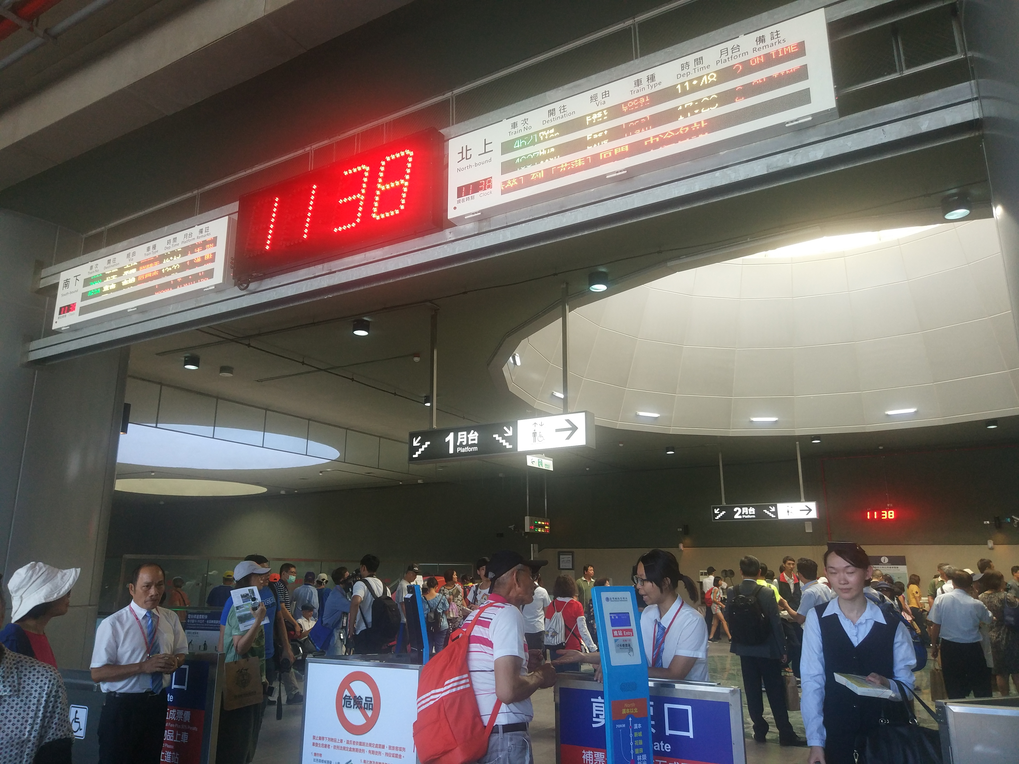 中文（台灣）: 台鐵林榮新光車站進出口閘門